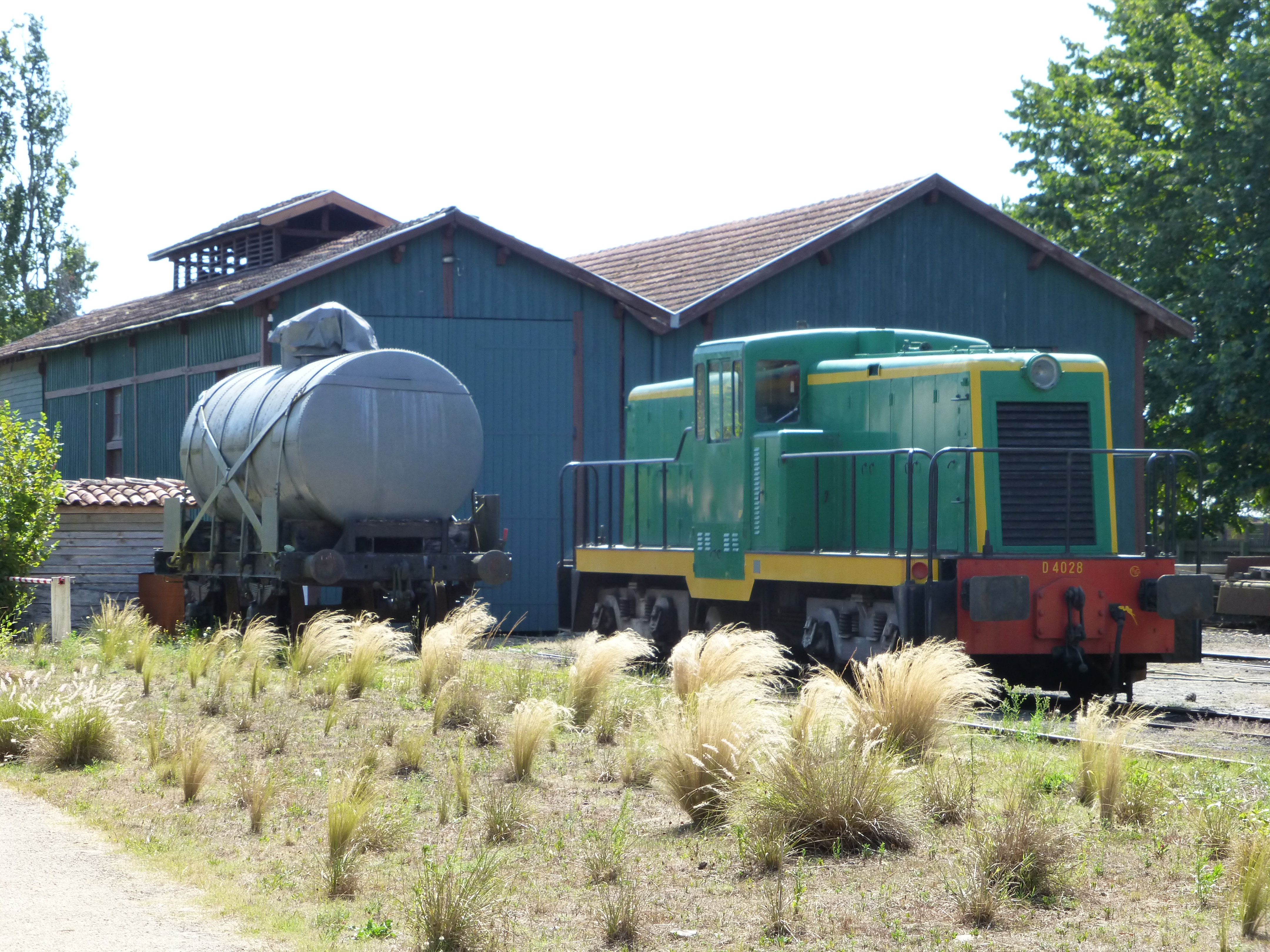 Locotrateur diésel électrique D-4028, restauré par le P.N.R.L.G. pour la desserte touristique de Marquèze, après avoir été utilisé pour le transport du pétrole de Parentis-en-Born (ex-7228 de l'US Army, acquis en 1946 par la Société générale des chemins de fer économiques de la Gironde).